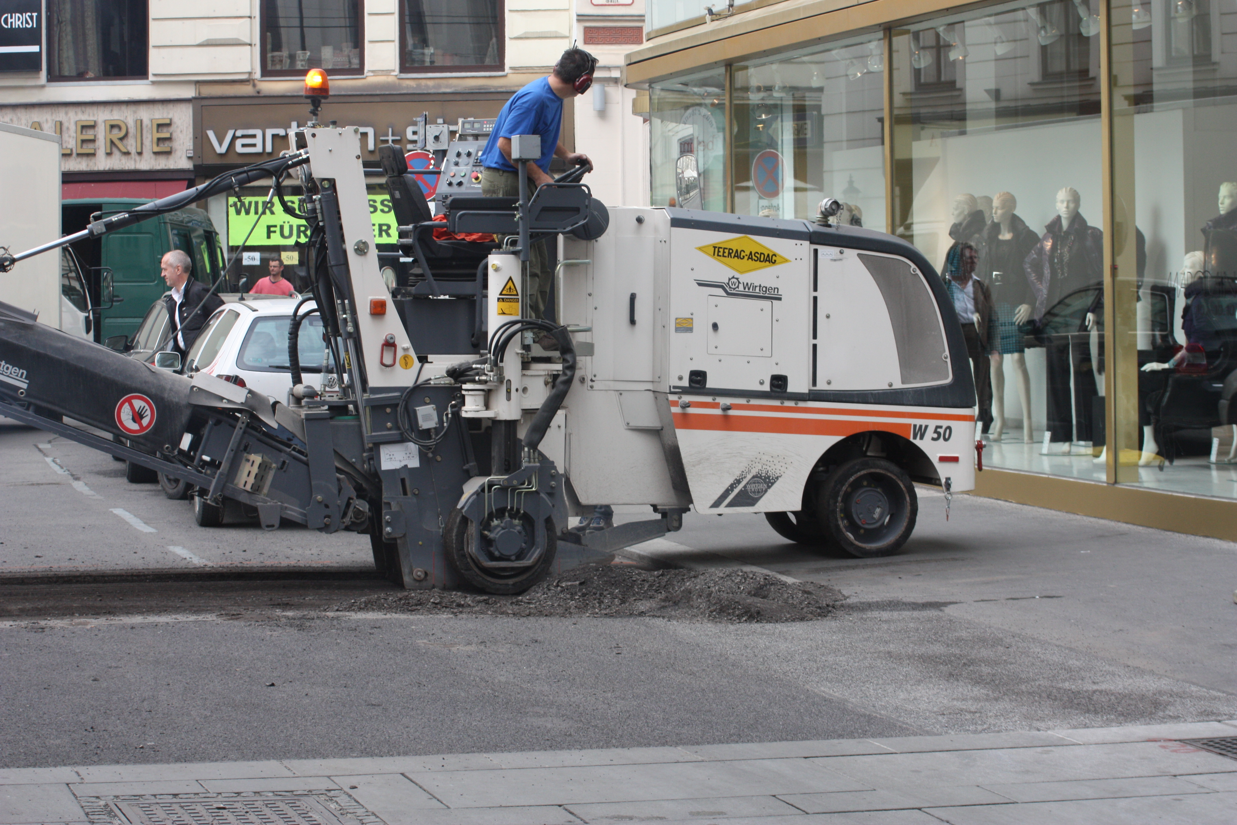 asphaltfräse, Construction machine, Wien, Vienna